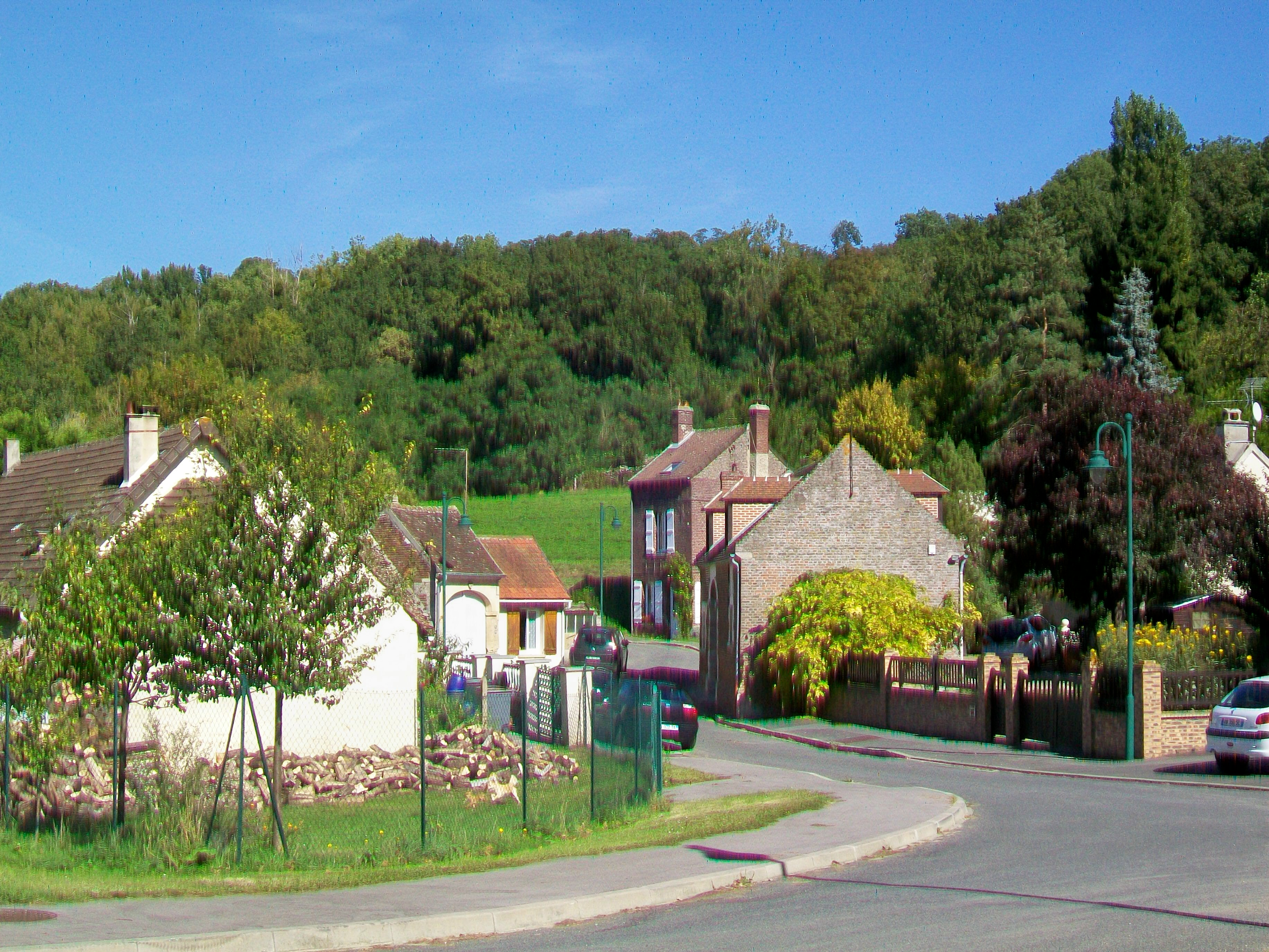 La rue de la Louvière, au-delà de l'ancienne voie ferrée d'Ormoy-Villers à Estrées.